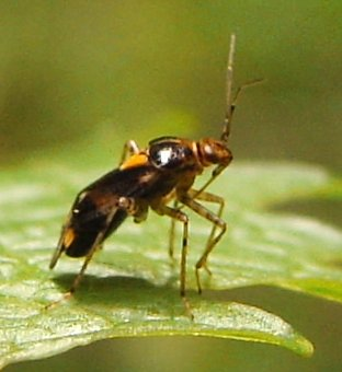 Liocoris tripustulatus (Miridae) on Alliaria petiolata in central Cologne, Germany.